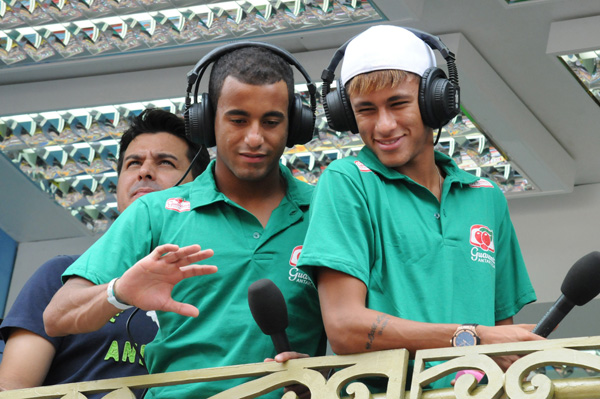 Lucas Rodrigues Moura da Silva e Neymar.